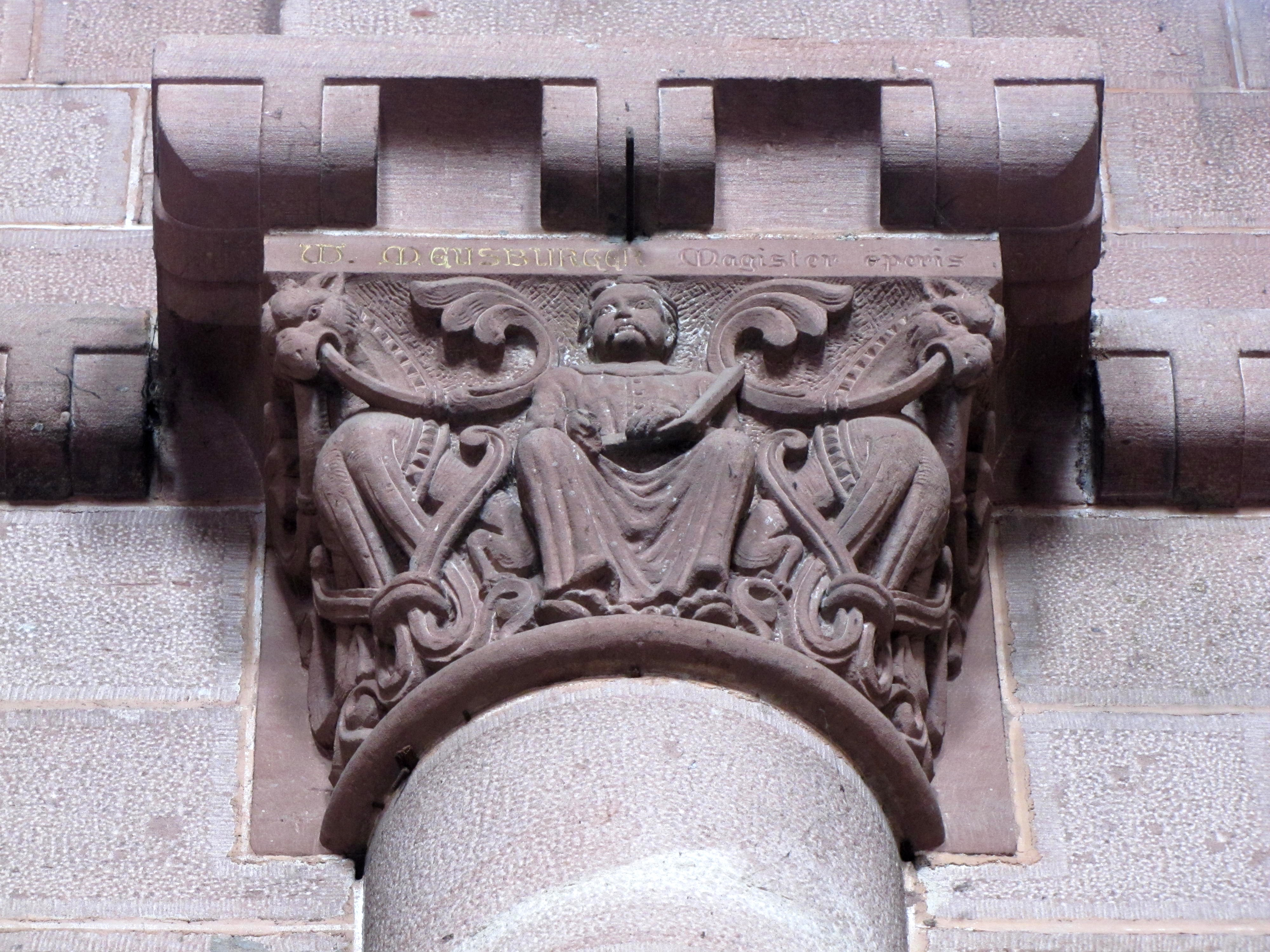 Alsace, Bas-Rhin, Sélestat, Église Sainte-Foy (PA00084981, IA00124586). Chapiteau néo-roman (1891) de la nef (représente l'entrepreneur W. Meusburger)